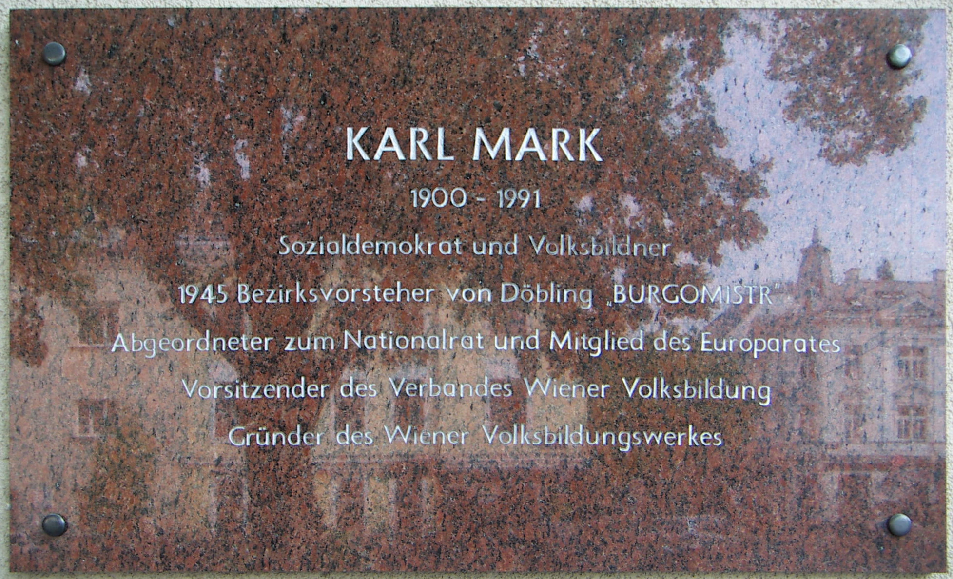 Karl Mark 1900-1991, Gedenktafel, Karl-Mark-Hof, Karl-Mark-Gasse, 1190 Vienna